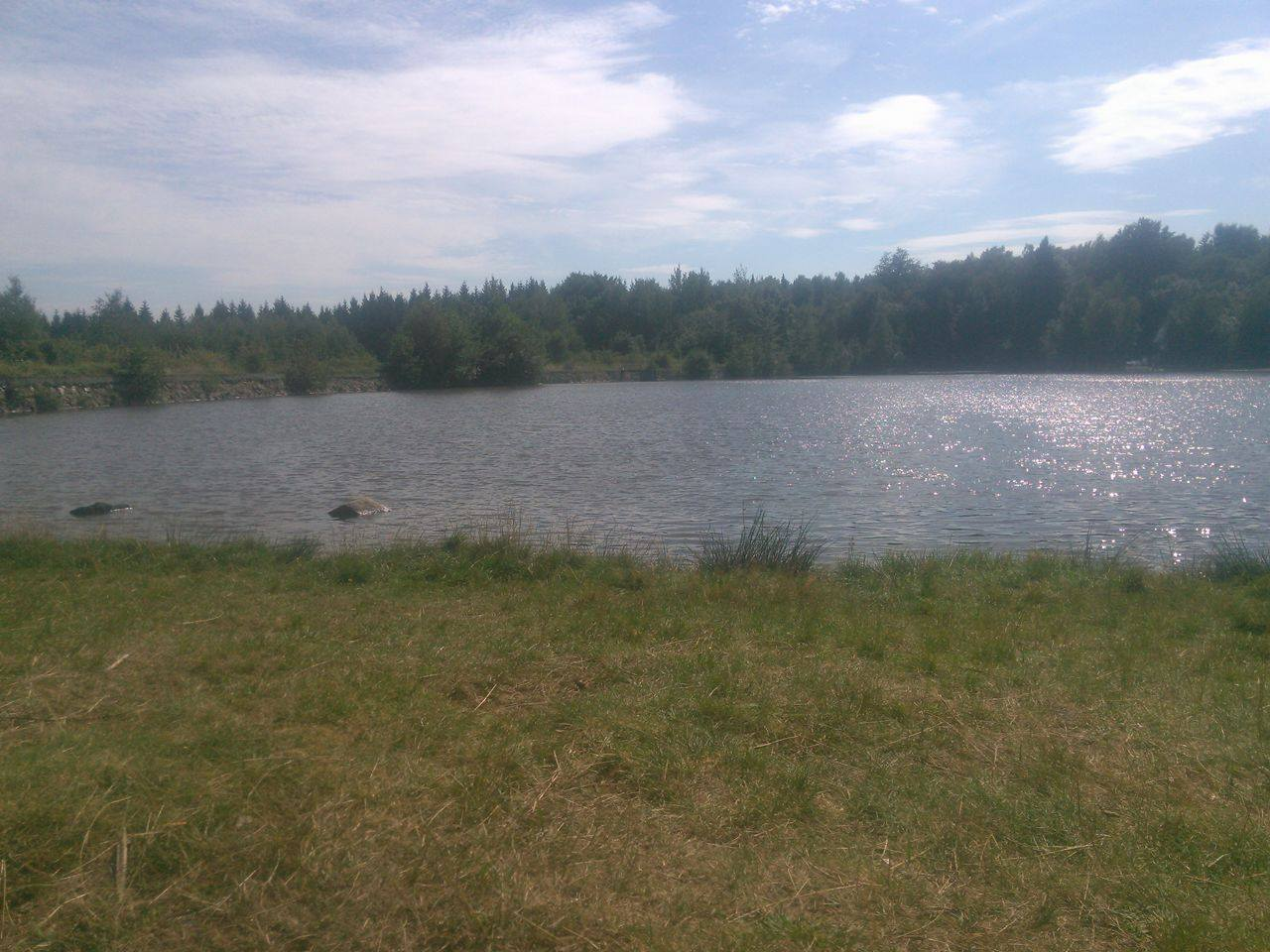 rybník